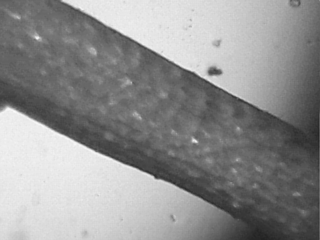 Stolone Utricularia blanchetii